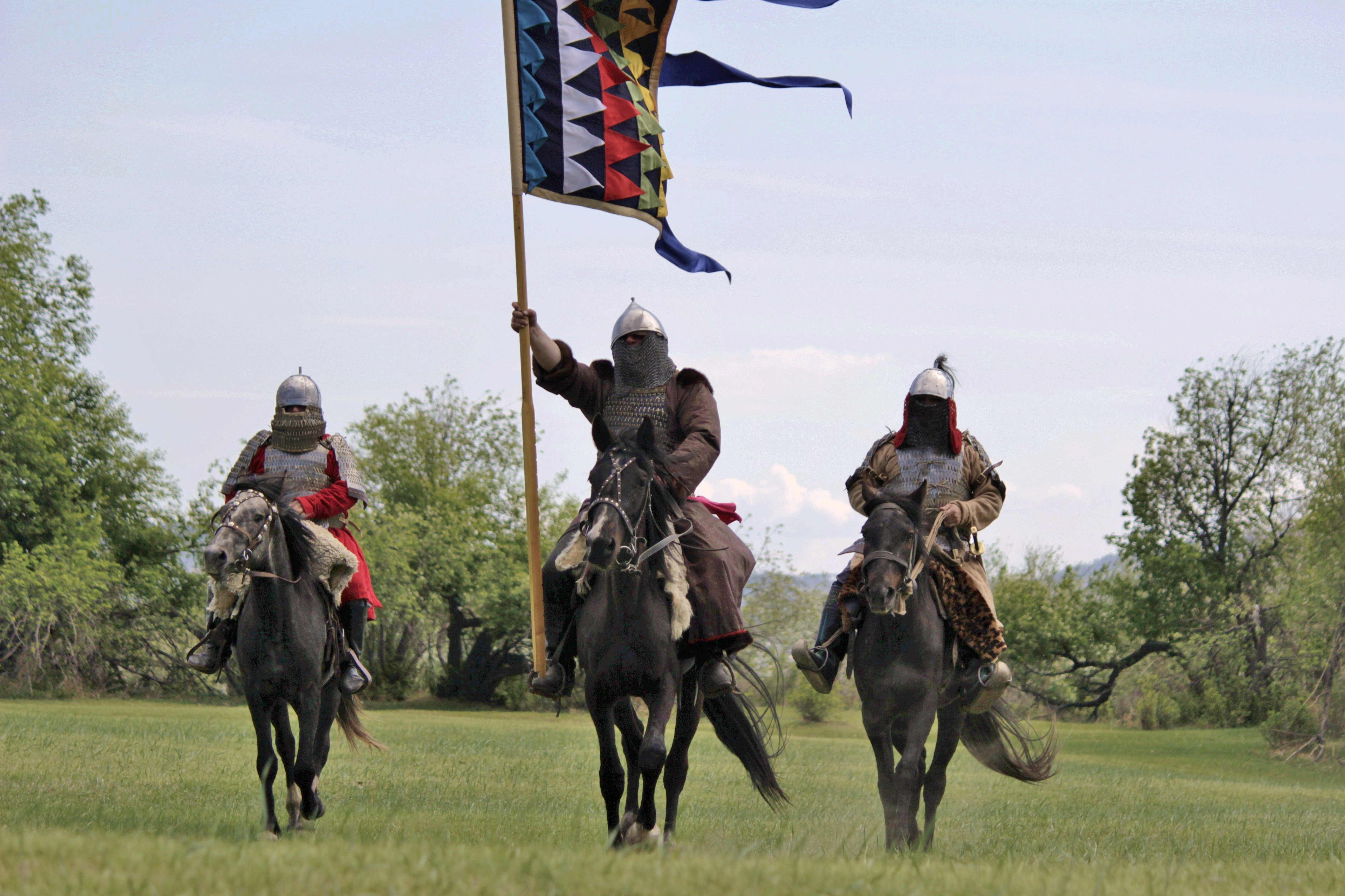 Воины Хунну. Иволгинское городище, расположенное в 15-ти километрах от столицы Бурятии - Улан-Удэ